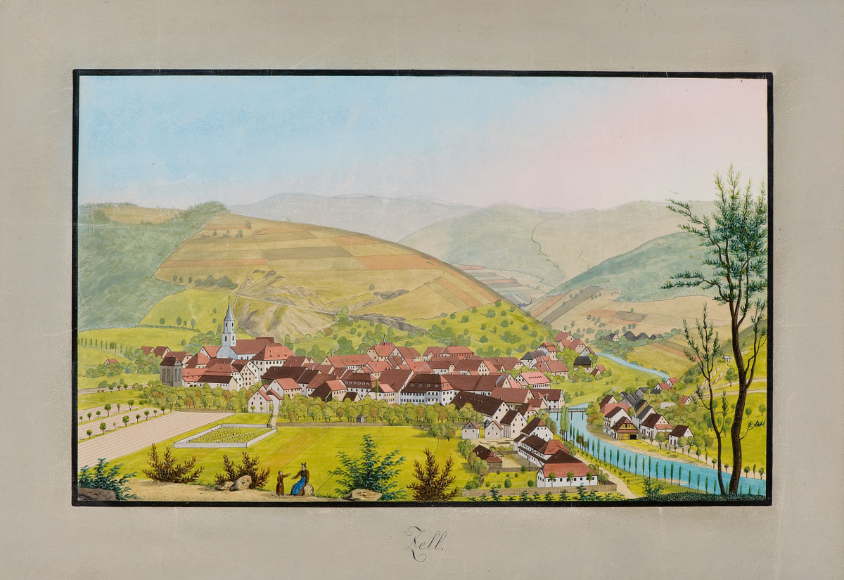 Zell. Gouache auf Papier. Unsigniert. 23 x 36,5 cm